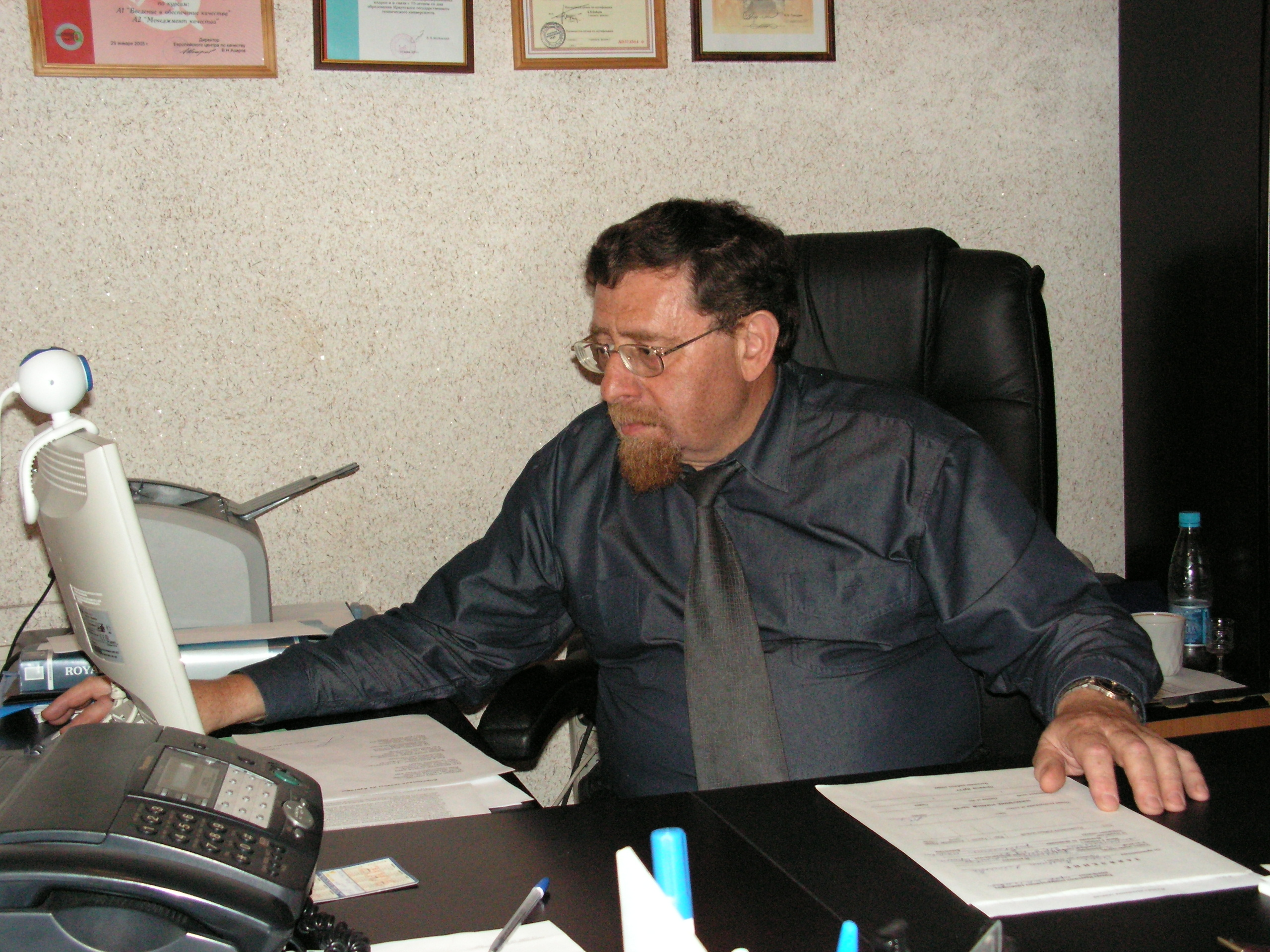 Лонцих Павел Абрамович, за работой